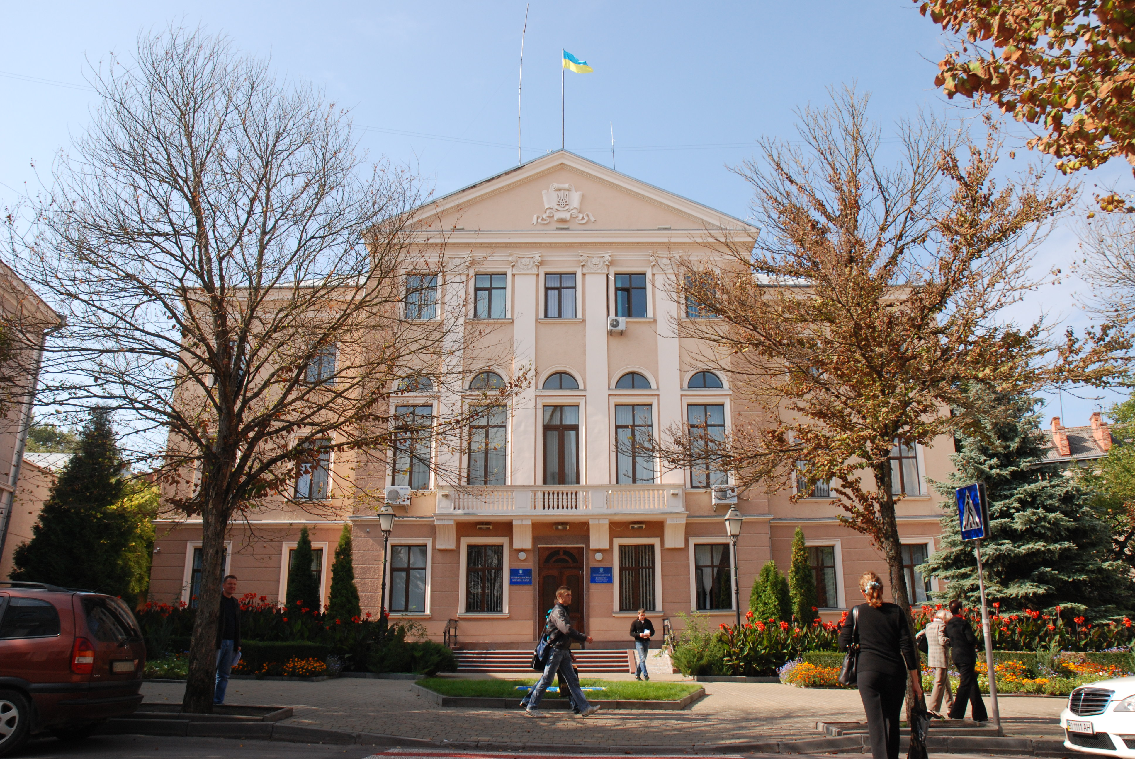 Колишній Будинок офіцерського зібрання (мур.) к.19 ст., зараз будинок Тернопільської міської ради.